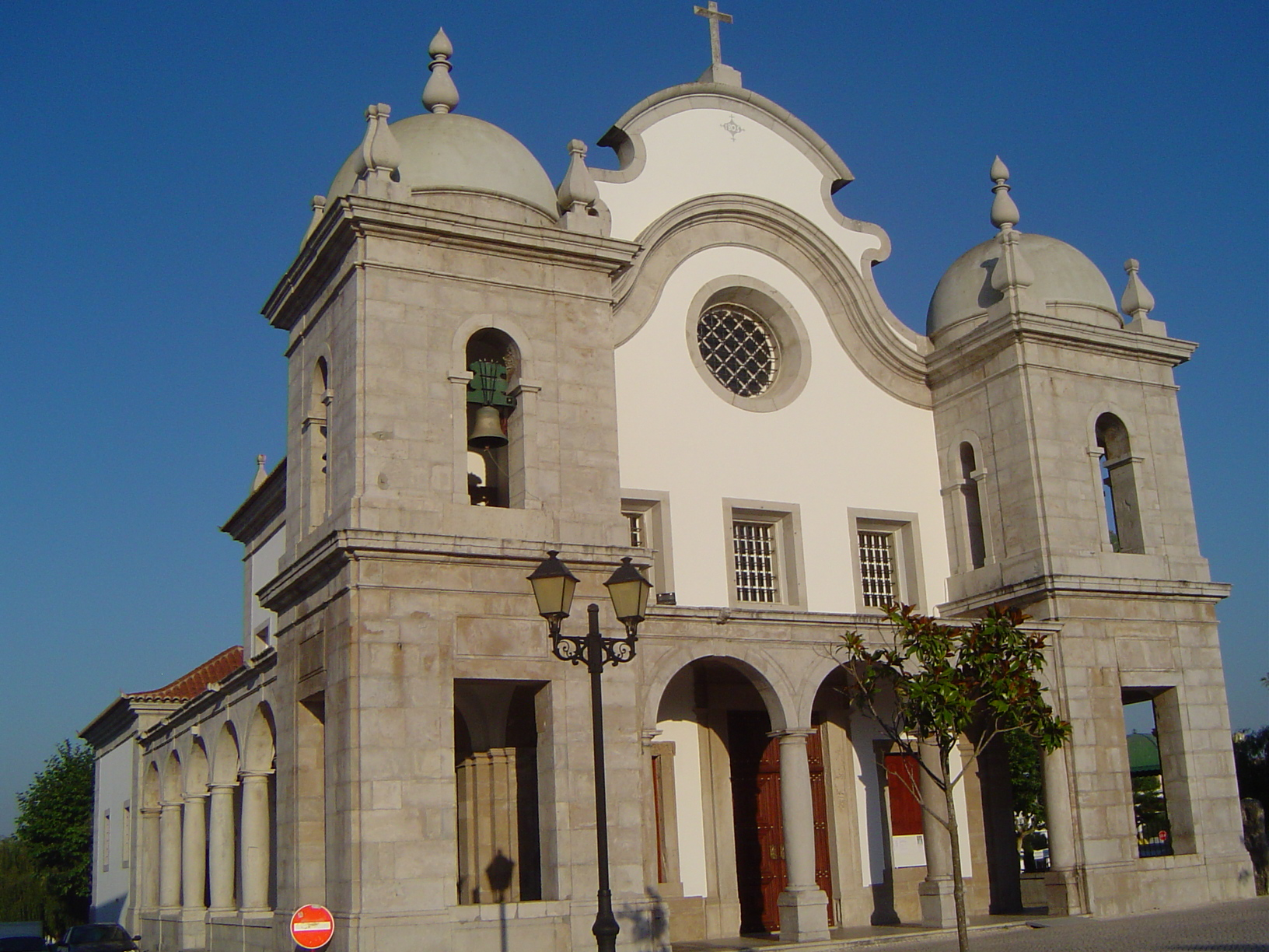 Igreja de Nossa Senhora da Conceição - Atouguia da Baleia